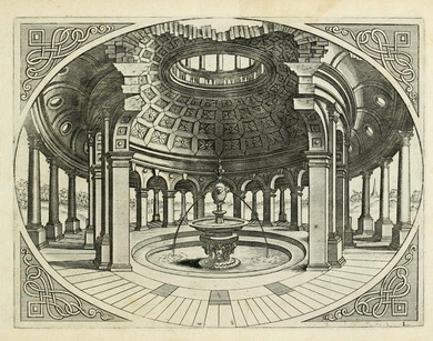 Ганс Вредеман де Вріс. «Проект ротонди».